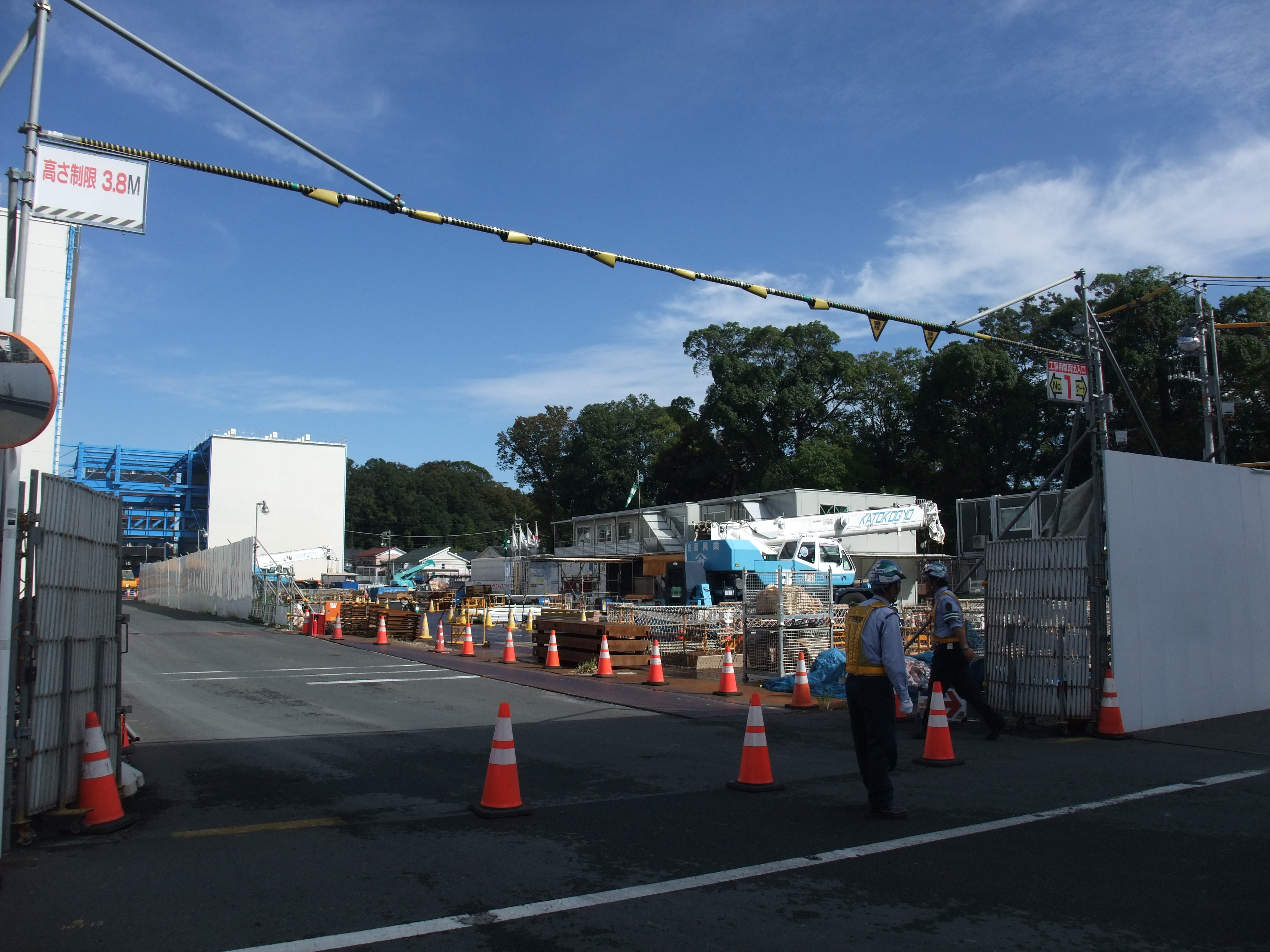 建設中の東急新横浜線新綱島駅（地上部分）